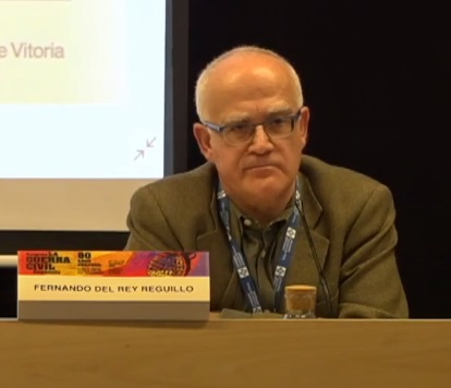 La Guerra Civil en el medio rural. Congreso La Guerra Civil Española: 27, 28 y 29 de noviembre de 2019.